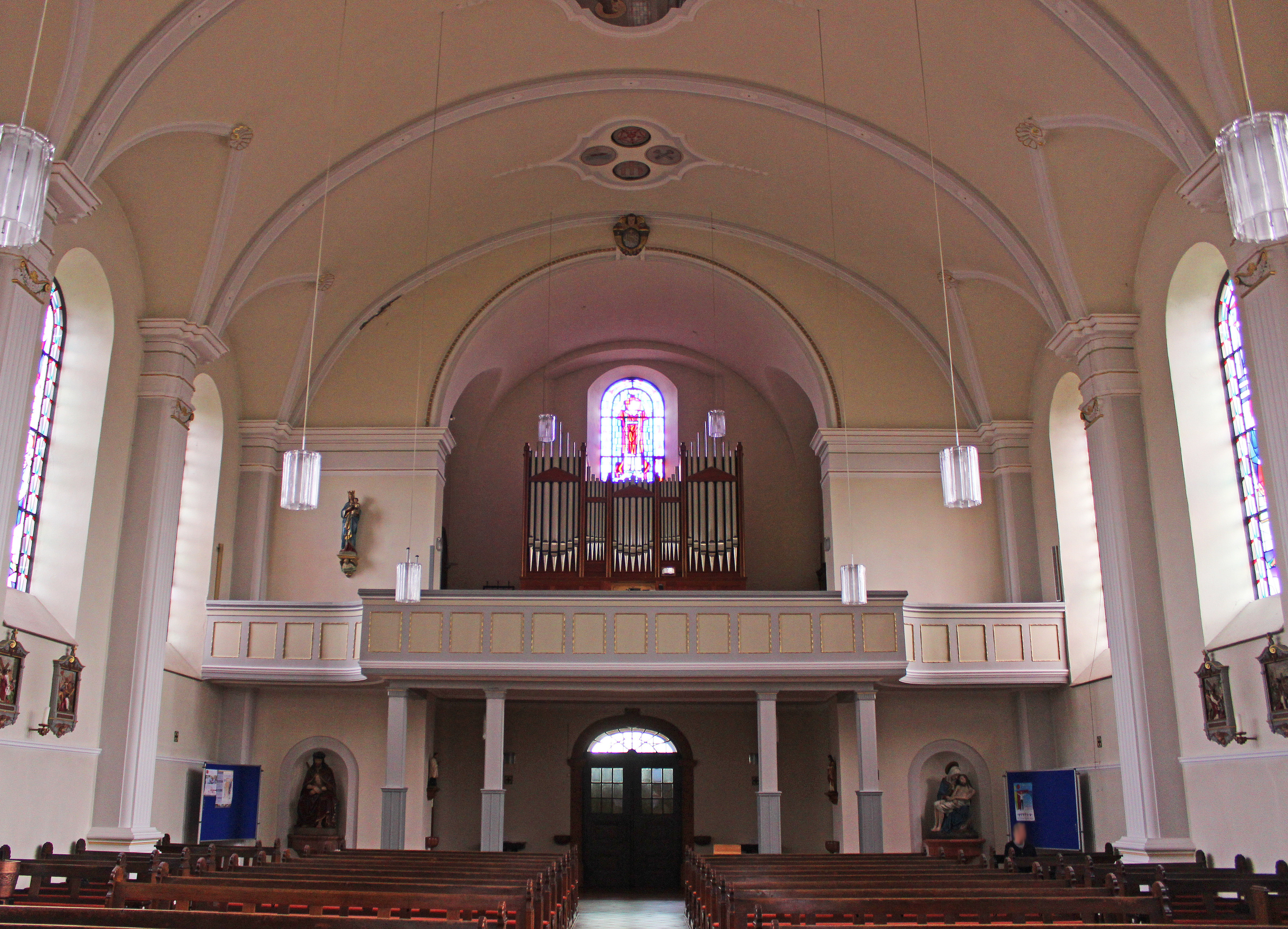 Blick ins Innere der katholischen Pfarrkirche St. Laurentius in Schwemlingen, einem Stadtteil von Merzig, Landkreis Merzig-Wadern, Saarland.